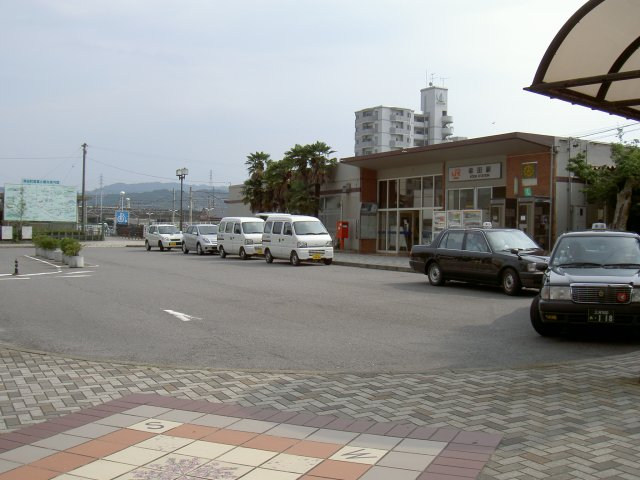 200506におはぐろ蜻蛉が撮影。東海道本線幸田駅。